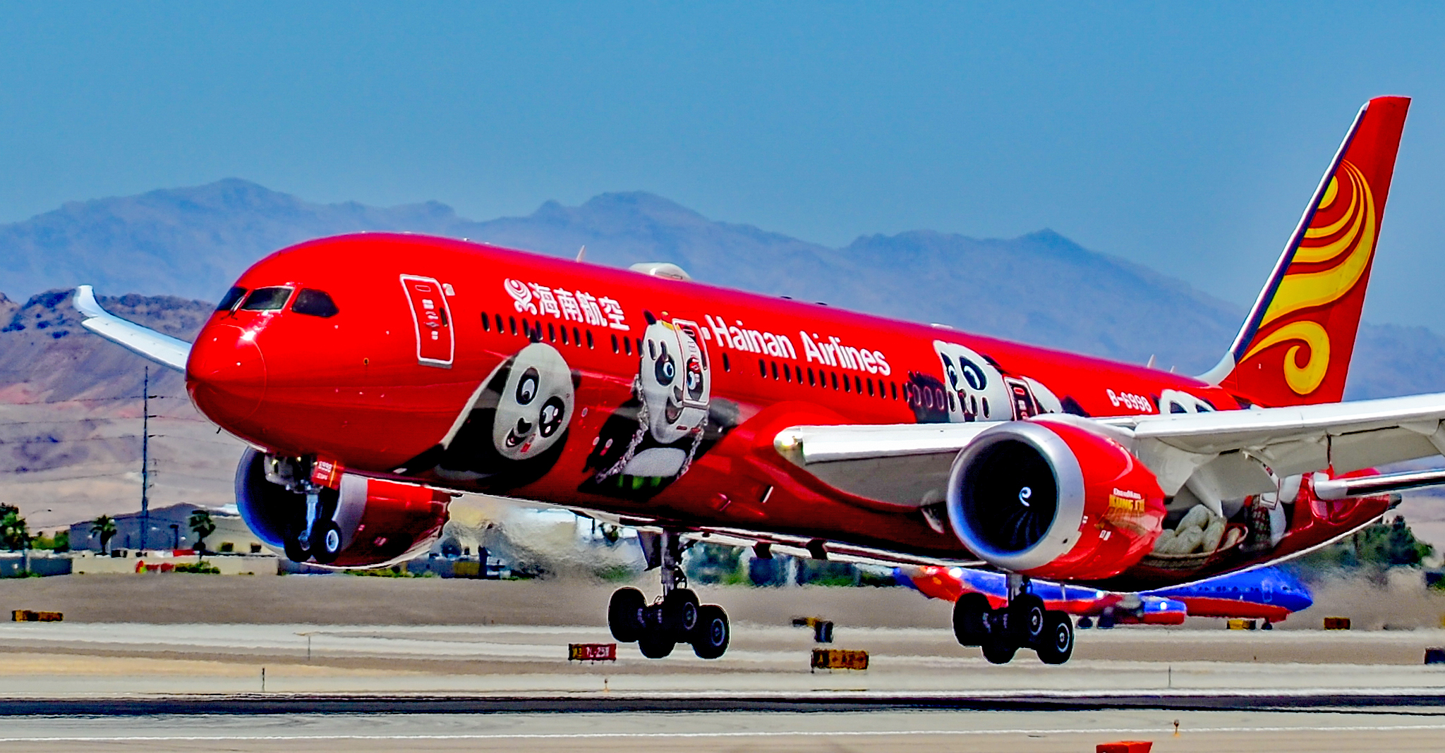 Las Vegas - McCarran International Airport (LAS / KLAS) USA - Nevada May 26, 2017 Photo: Tomás Del Coro